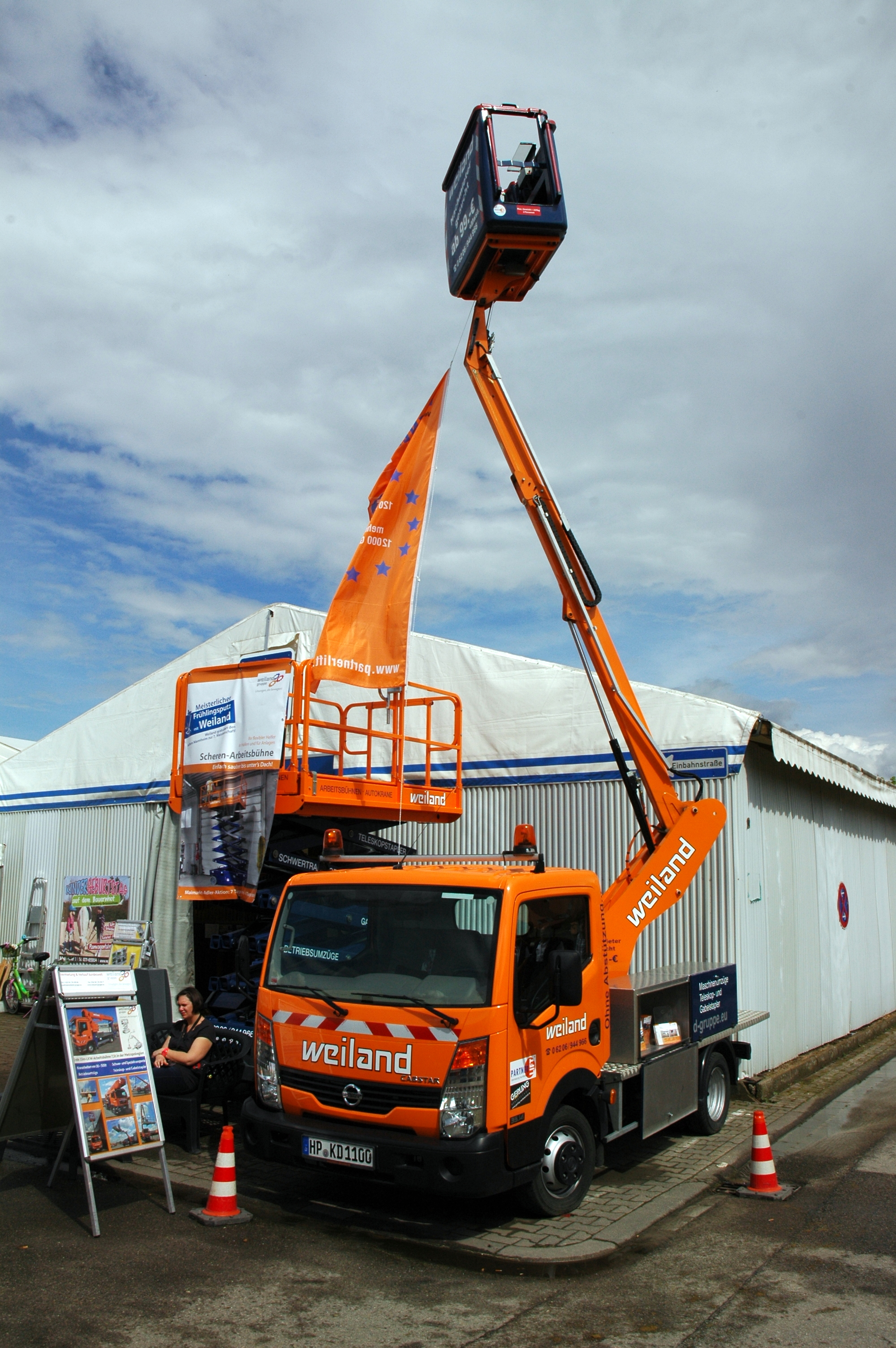 Maimarkt Mannheim 2015: Nissan Cabstar 3314